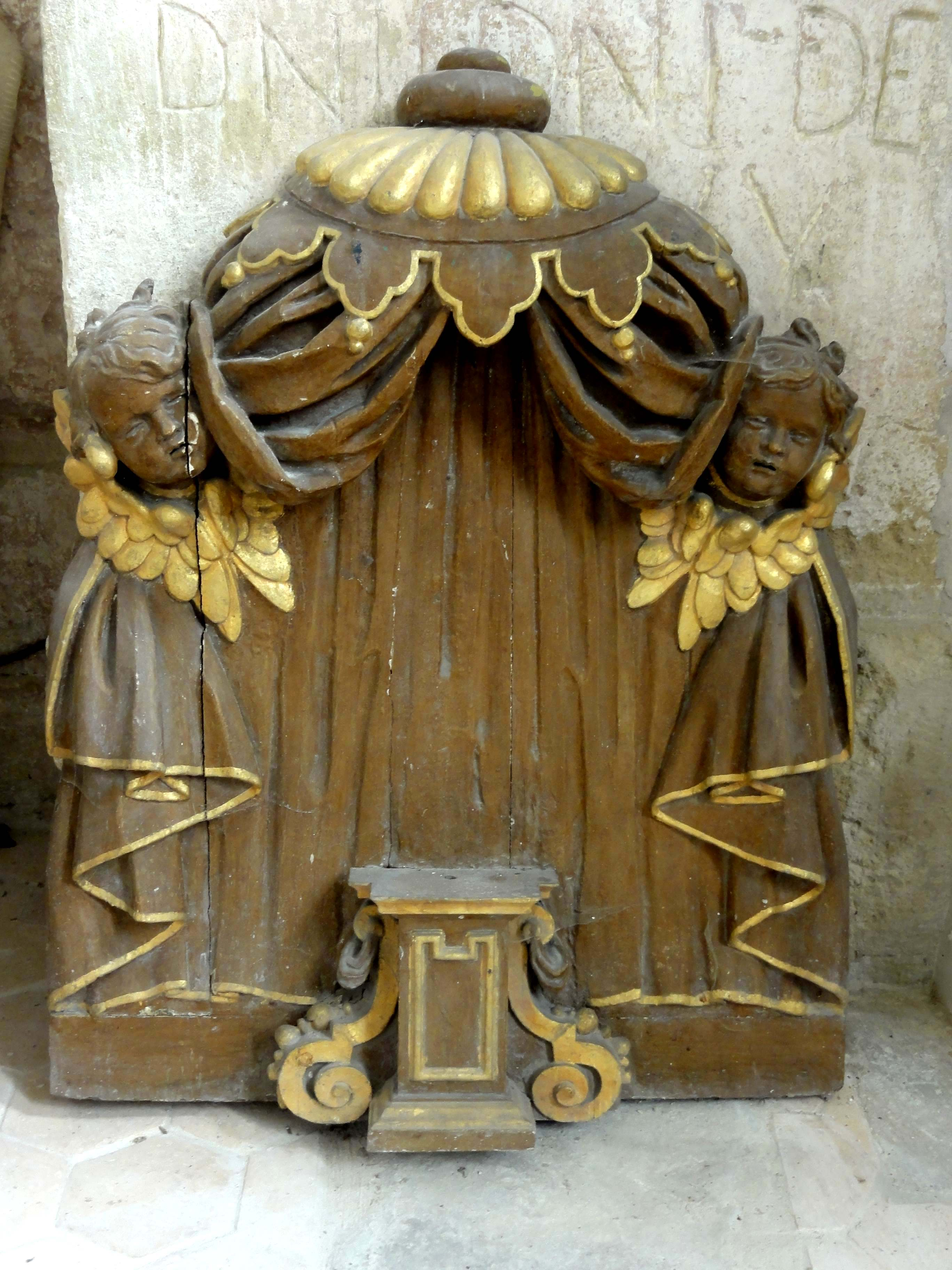 Mobilier de l'église (voir titre).